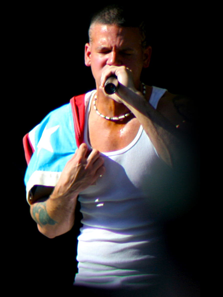 Calle 13 en directo en Nueva York con la bandera puertoriqueña, en la foto Residente.